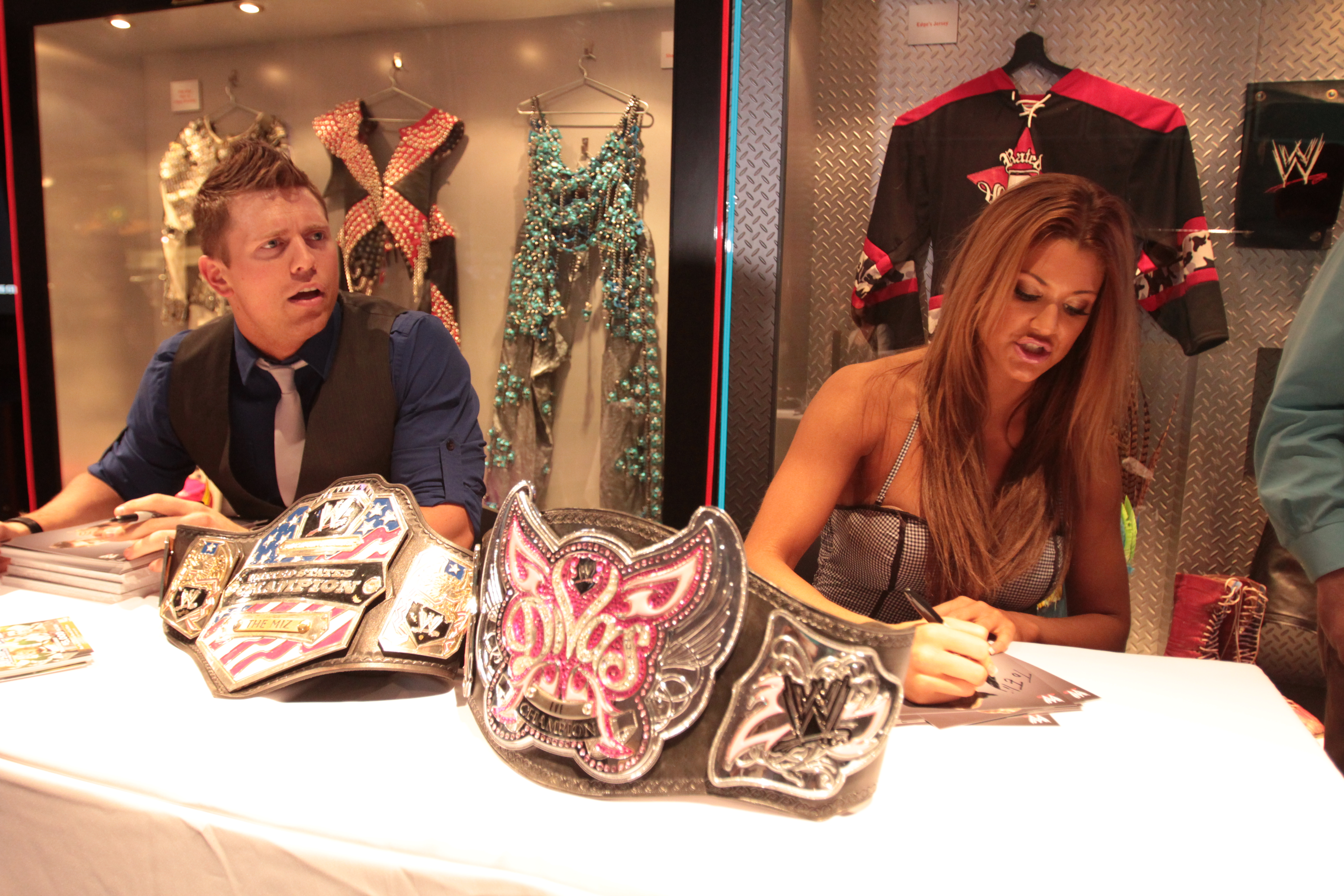 Cette photo a été prise le 15 juin 2010 avec un Canon EOS REBEL T2i. The Miz et Eve Torres lors d'une séance de dédicaces.